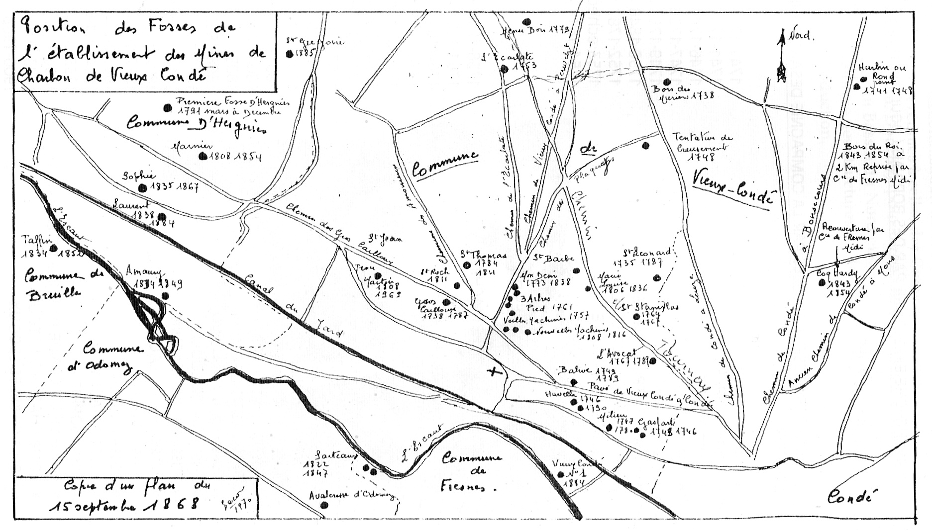 Les puits de mines situés dans la ville de Vieux-Condé (France). Première publication en 1868. Les puits creusés après cette date ne sont pas indiqués.